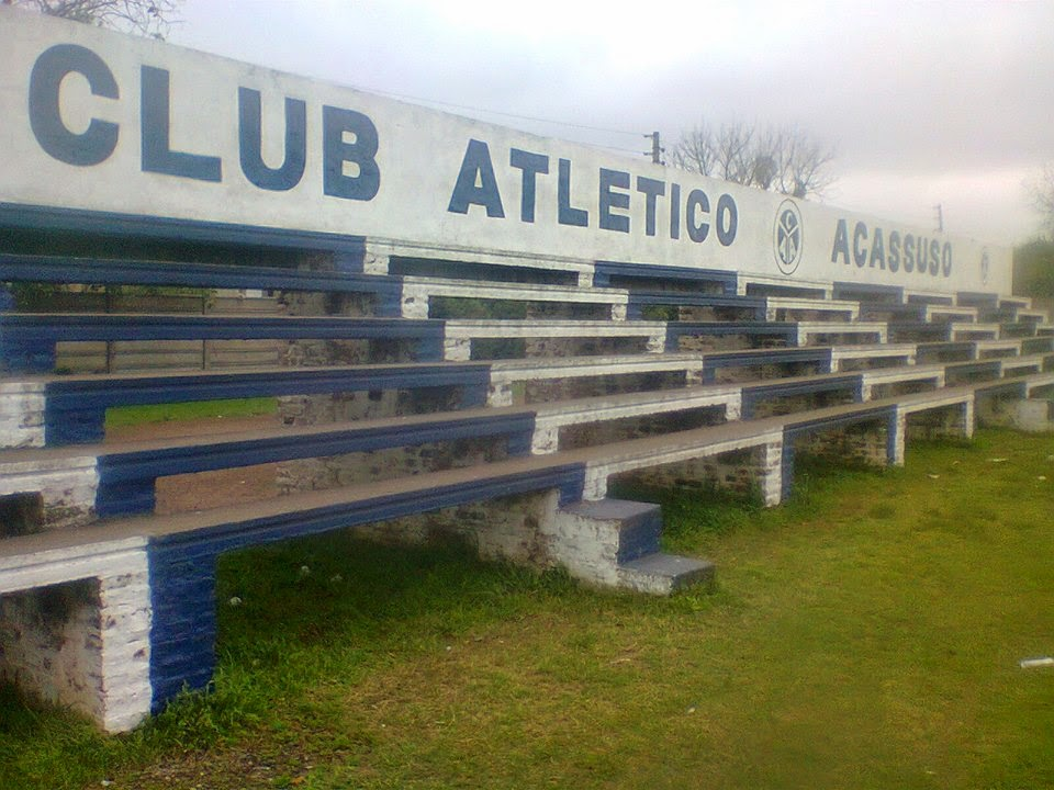 Tribuna de la cancha